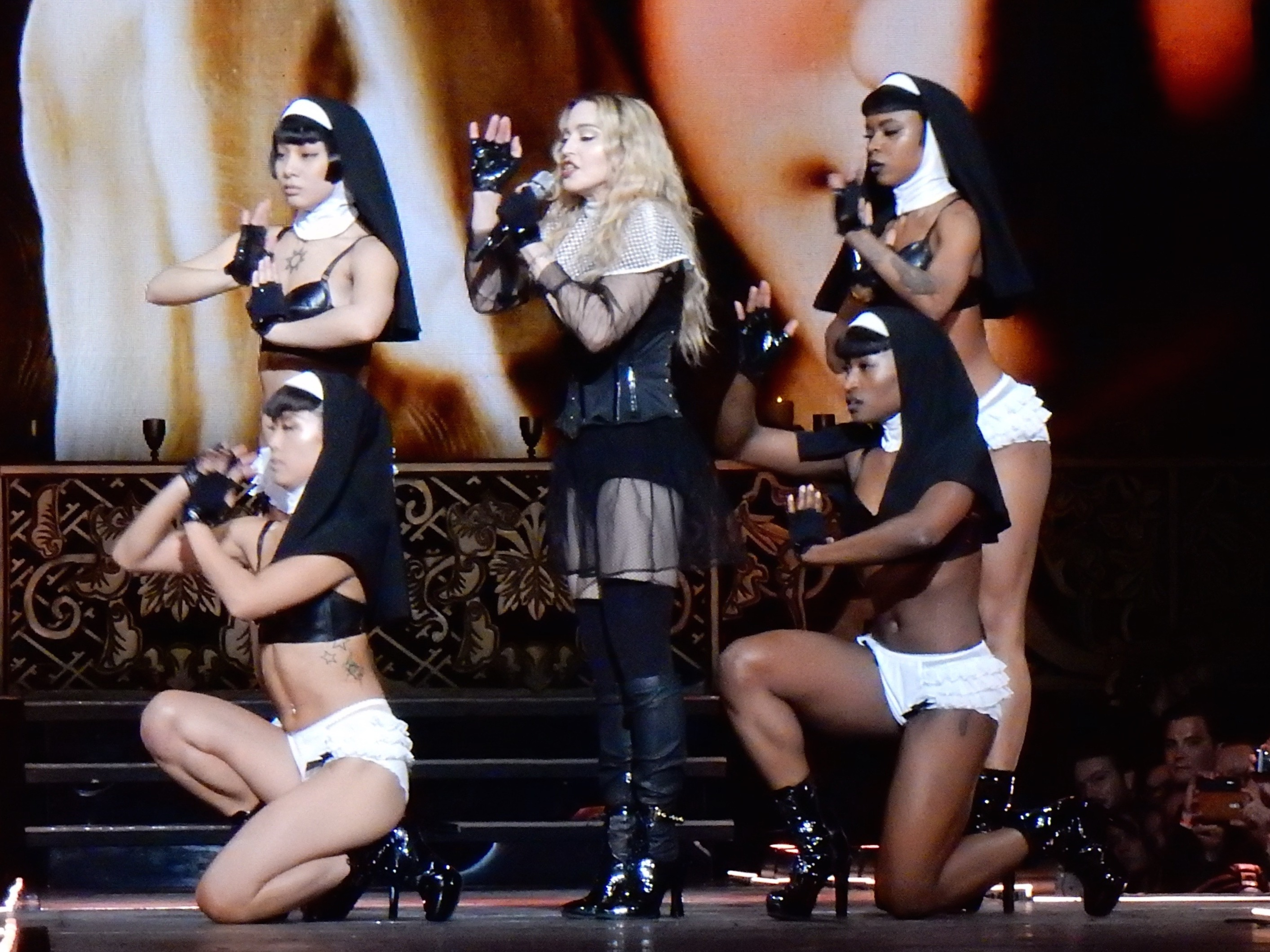 Madonna Rebel Heart Tour 2015 - Stockholm